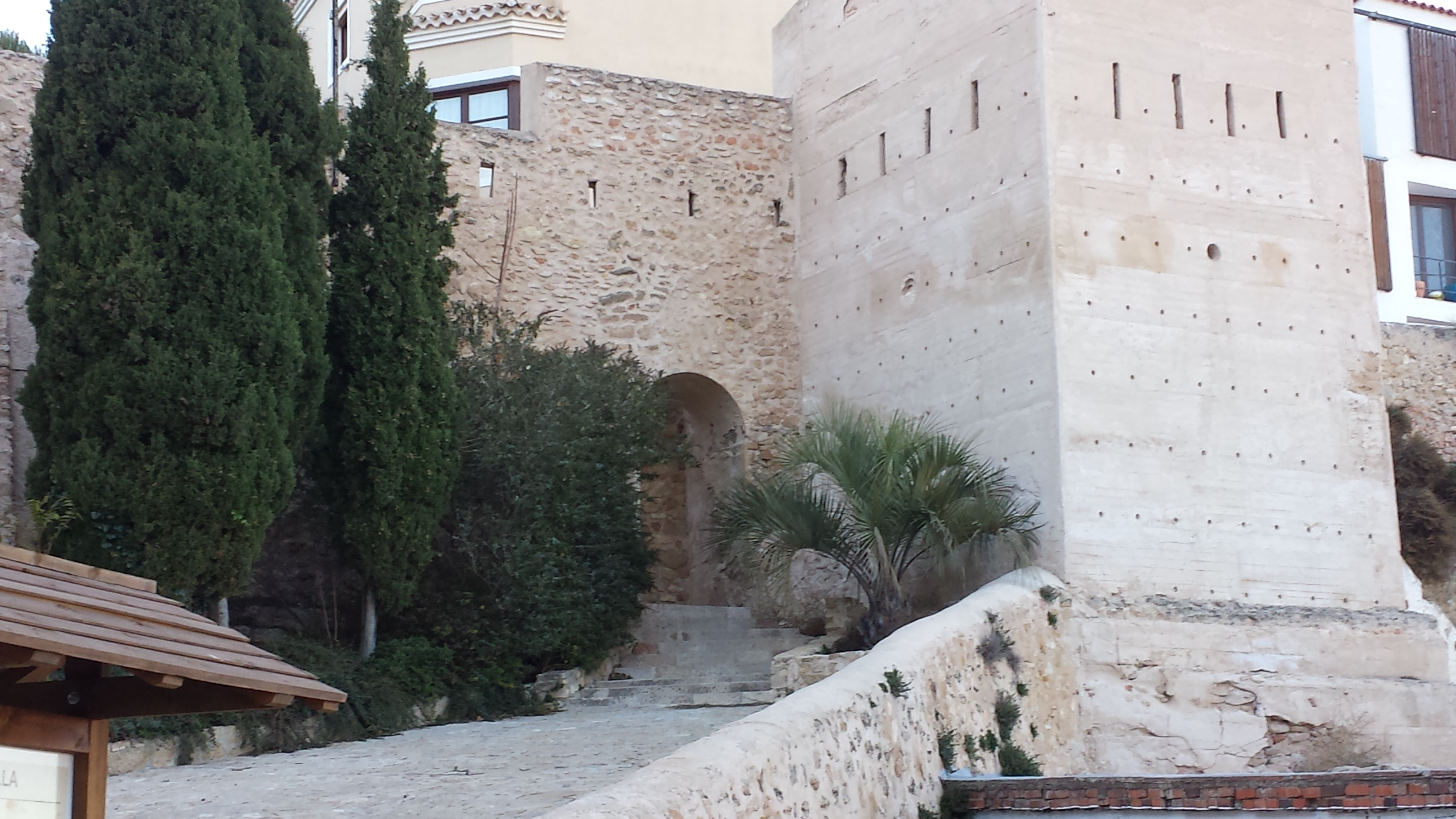 Puerta de Chinchilla